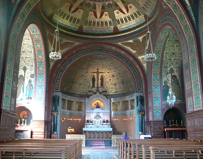 Abteikirche St. Martin, Beuron Blick in die Gnadenkapelle Ausmalung von P. Paulus Krebs, 1898-1904 Paulus Krebs (1849–1935) Alternative namesKrebs, Adolf; Krebs, Paul; Pater Paulus Krebs OSBDescriptionGerman painterDate of birth/death12 March 184915 March 1935Location of birth/deathTschugg (Kanton Bern)?Work locationBeuronAuthority control : Q18508580 VIAF: 171036061 GND: 1012281299